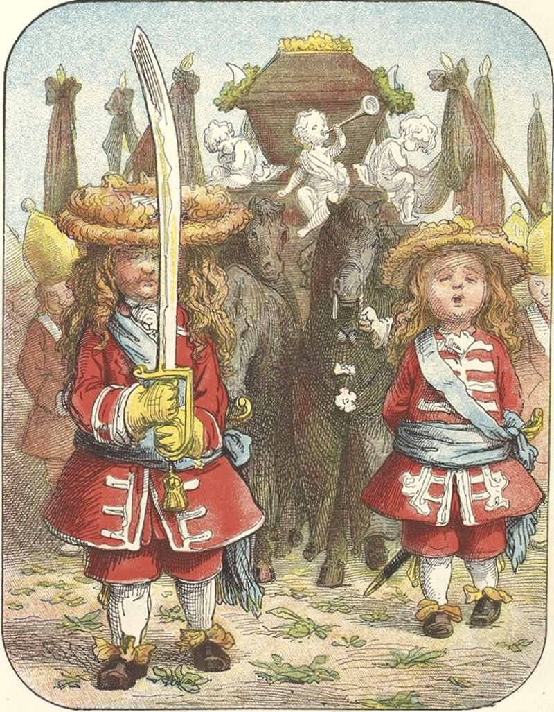 Malbrough s'en va-t-en guerre, 1878, dessins par Frølich (1820-1908), textes par Stahl, Hetzel éditeur ː page 7.